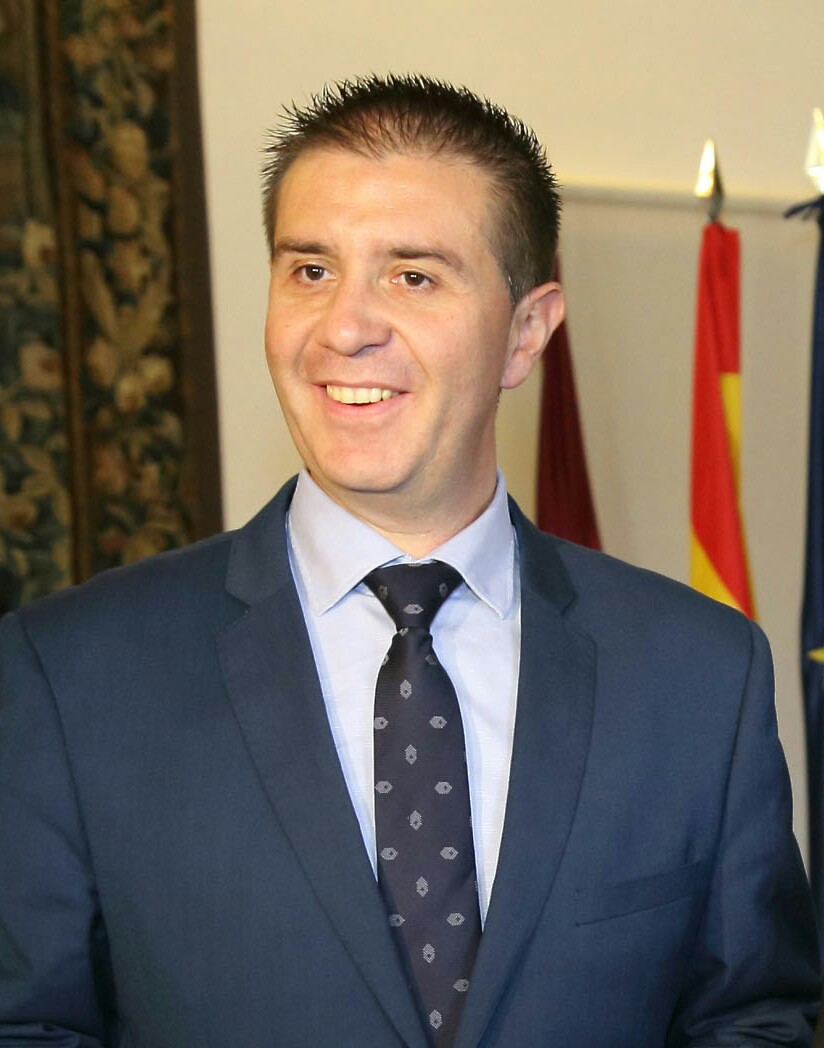 Santiago Cabañero, presidente de la Diputación de Albacete